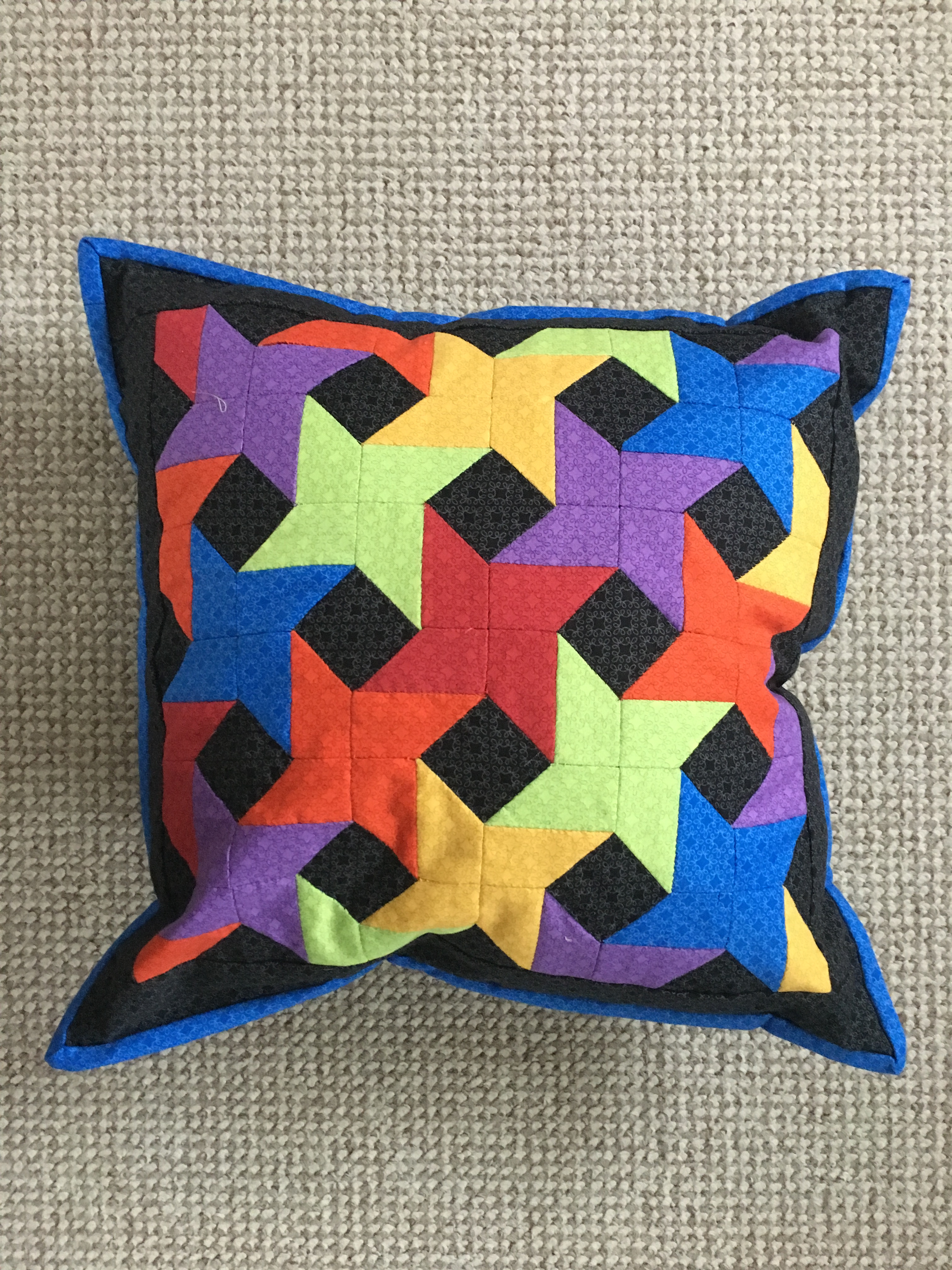 En meget flot klassisk pude syet som patchwork i hånden.